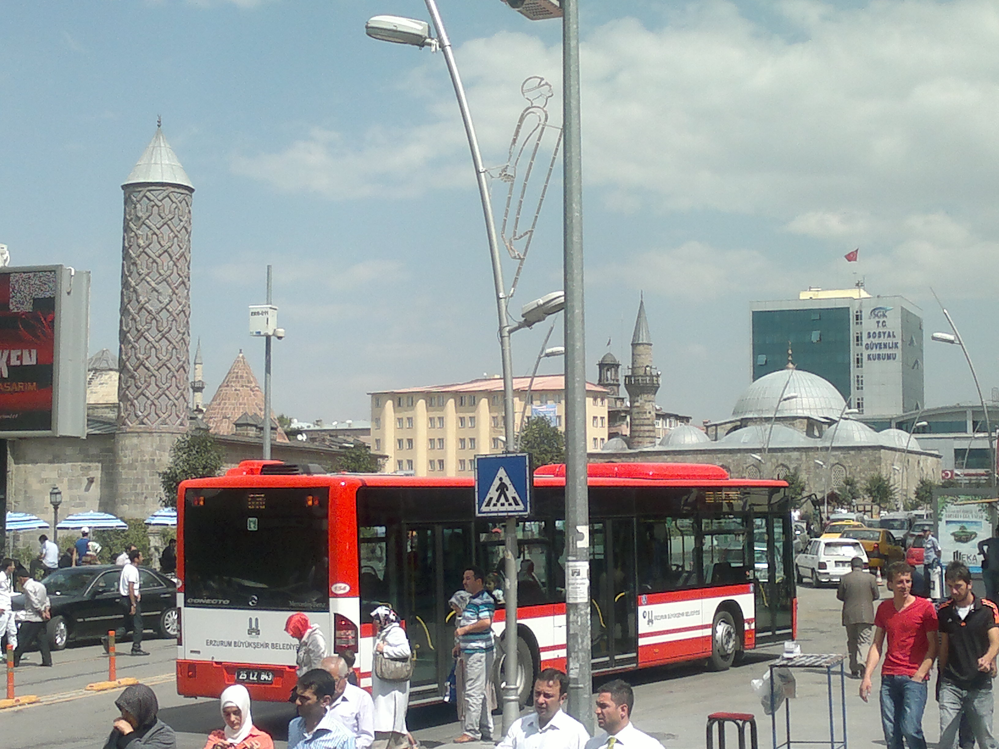 Erzurum Cumhuriyet Caddesi